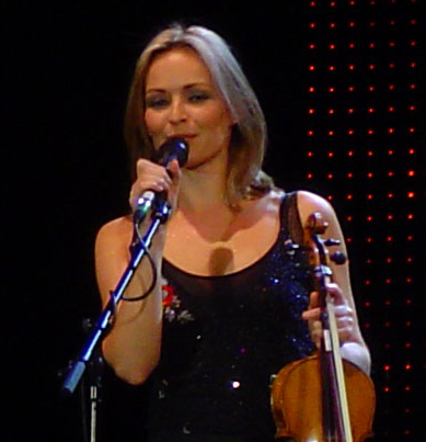 Sharon et Andrea Corr lors du concert du 20 octobre 2004 à Stuttgart